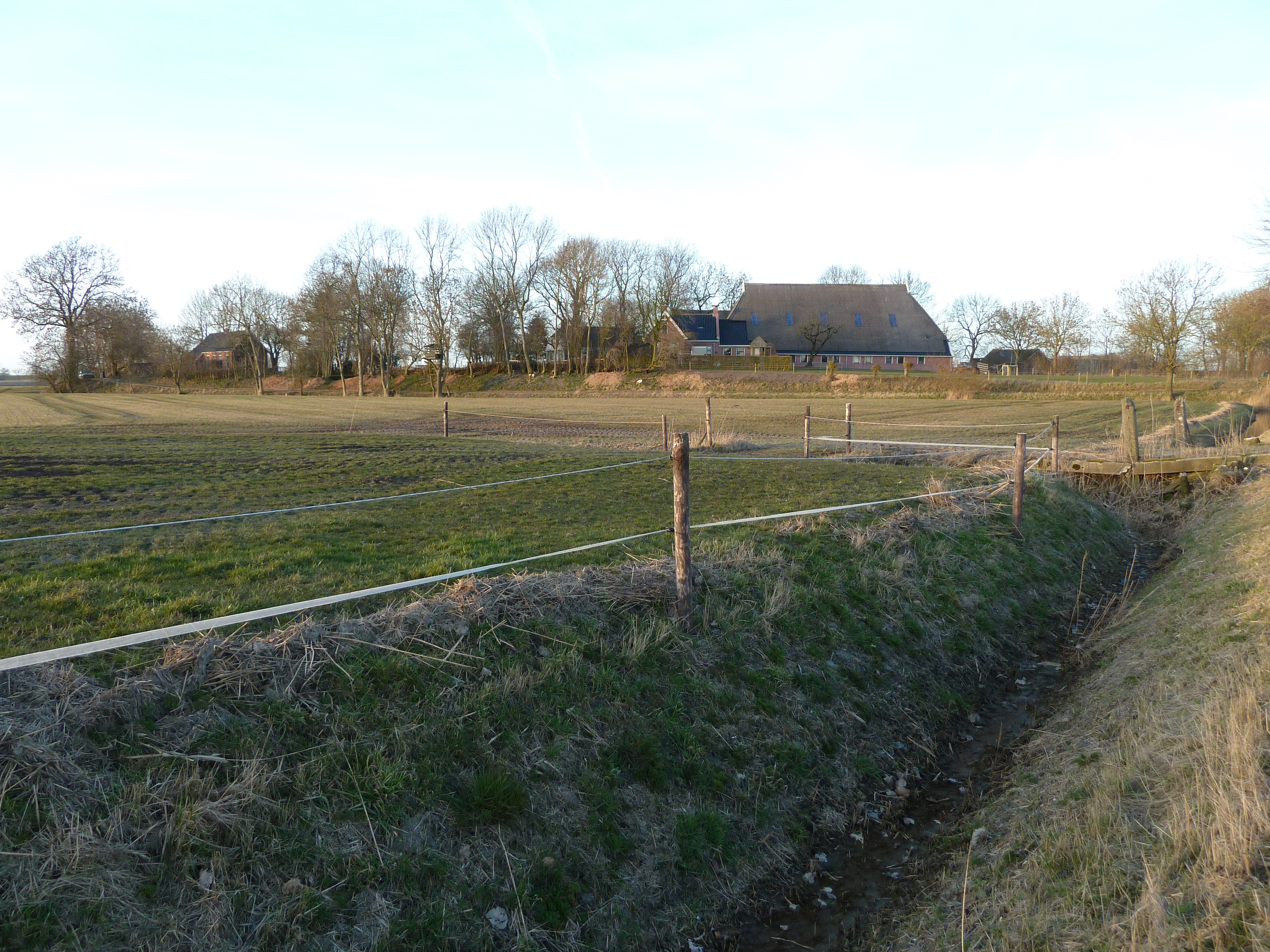 Steilrand van de wierde Aalsum (Humsterland, Groningen) gezien vanaf de Aalsumerweg.